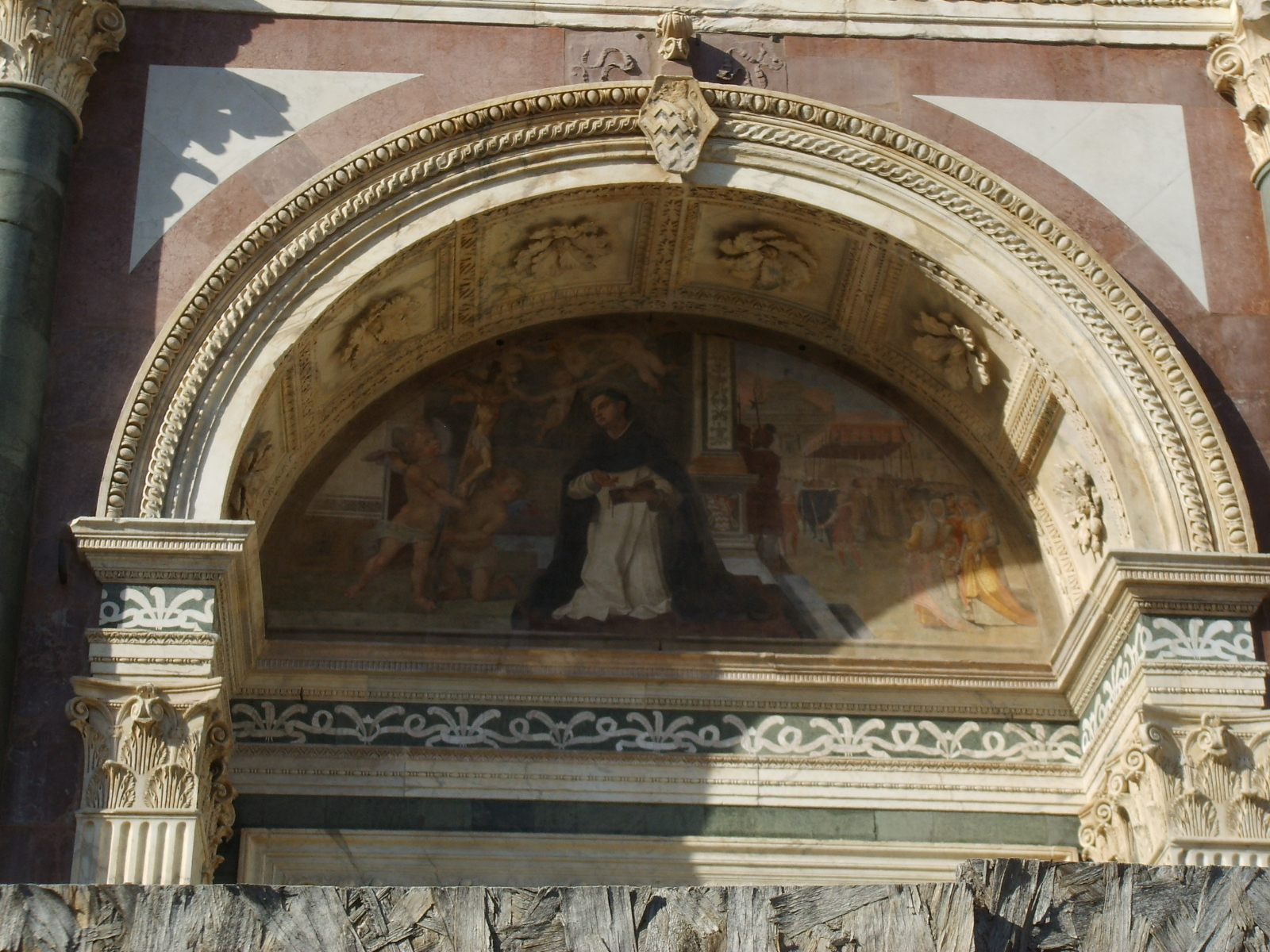 Dettaglio della facciata di Santa Maria Novella a Firenze: arco del portale, con stemma Rucellai nella chiave di volta.